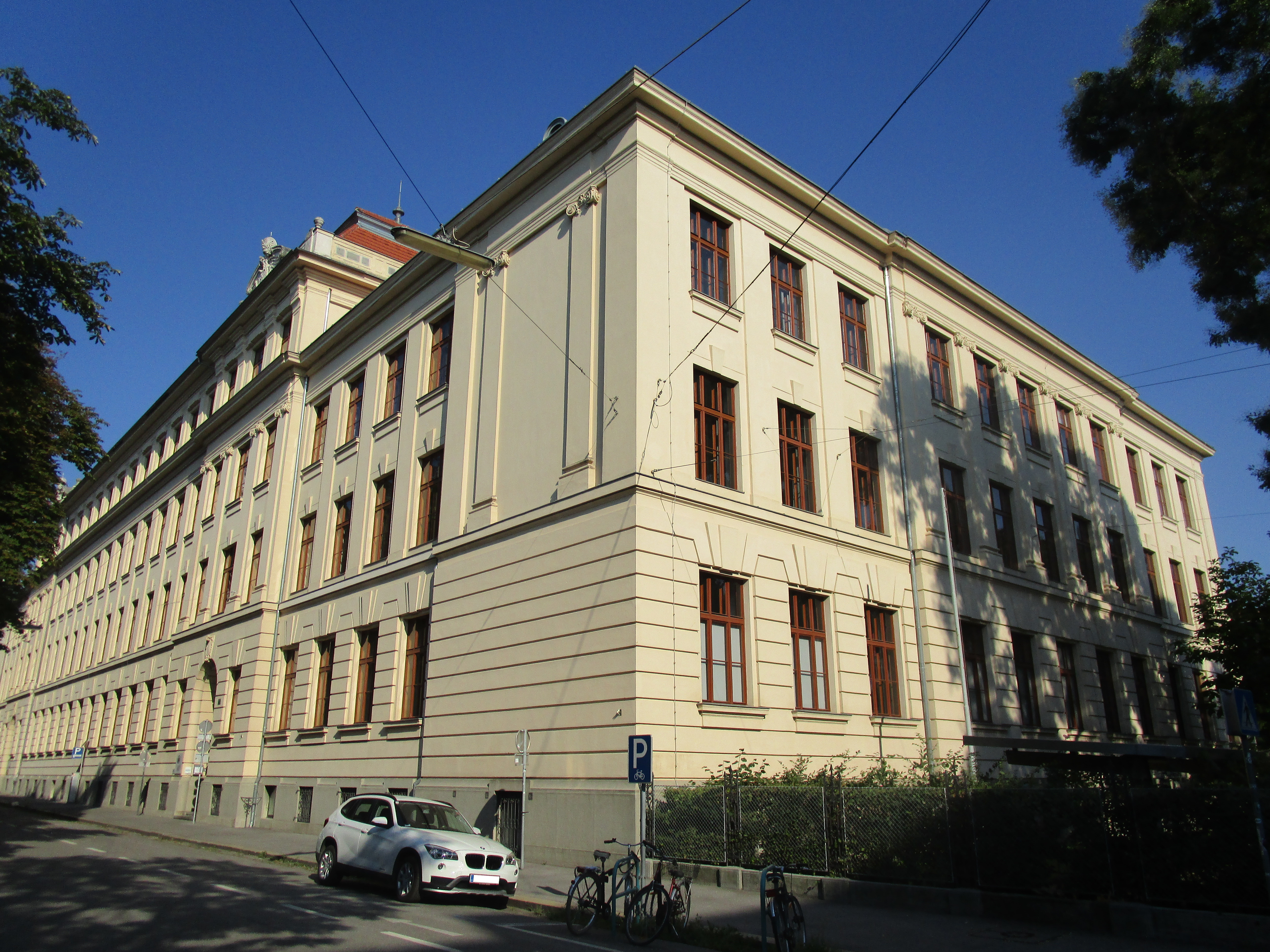 Pädagogische Hochschule Steiermark in Graz, Hasnerplatz 11-12